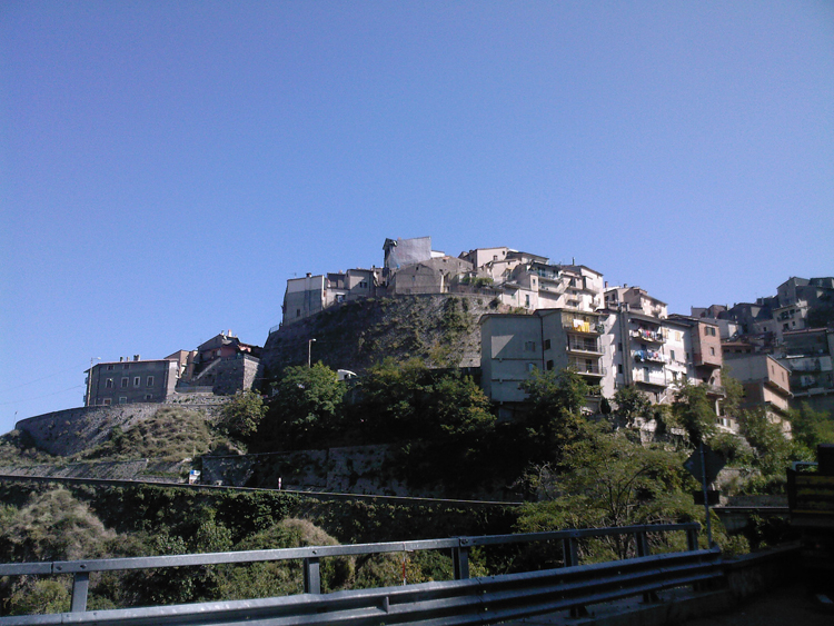 Longobucco.